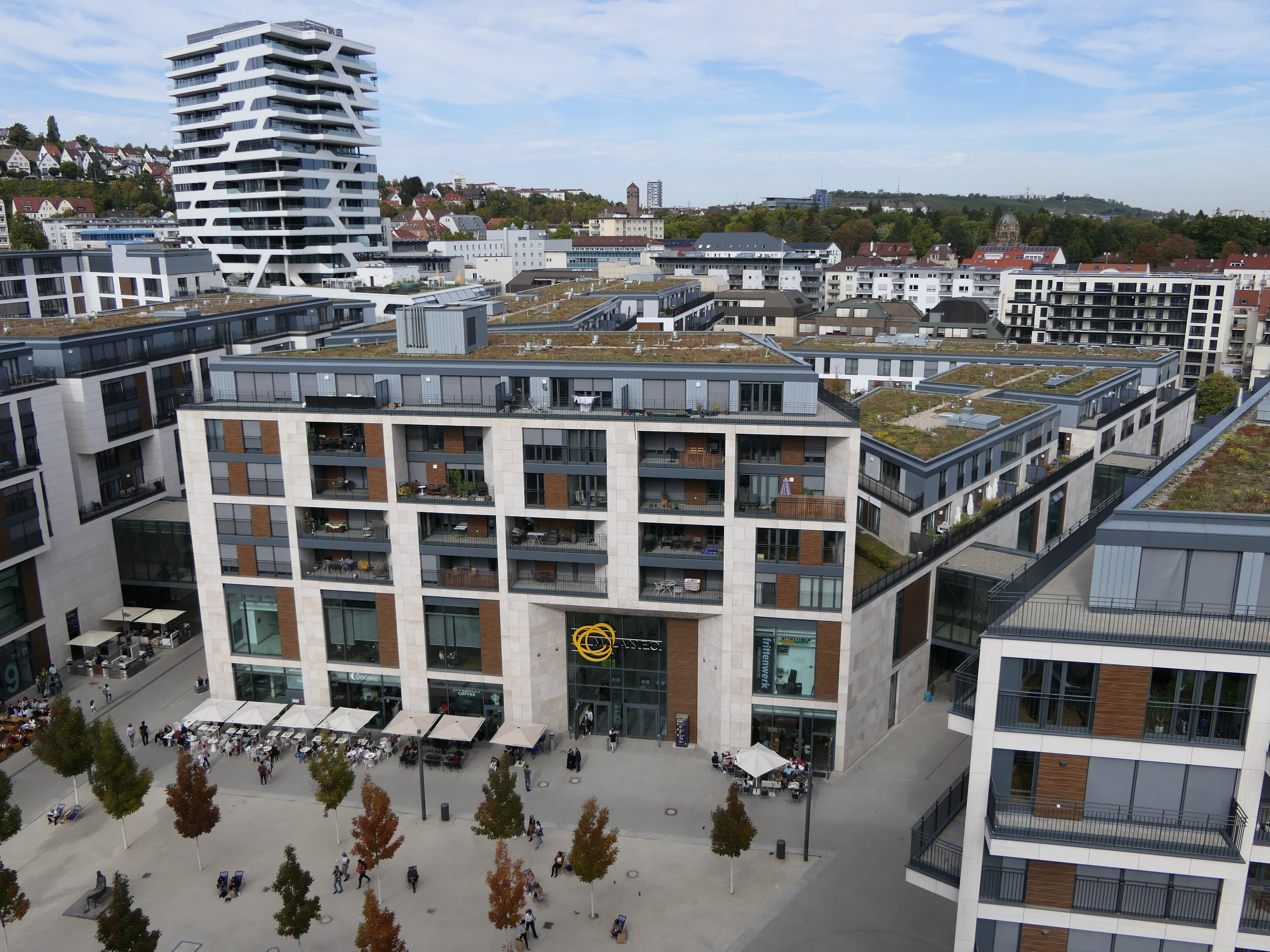 Blick von der Stadtbibliothek auf den mittleren Gebäudeteil des Einkaufszentrums Milaneo in Stuttgart.